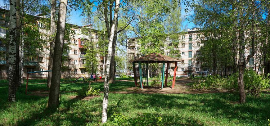 двор в Черёмушках (Кирово-Чепецк, проезд Лермонтова)